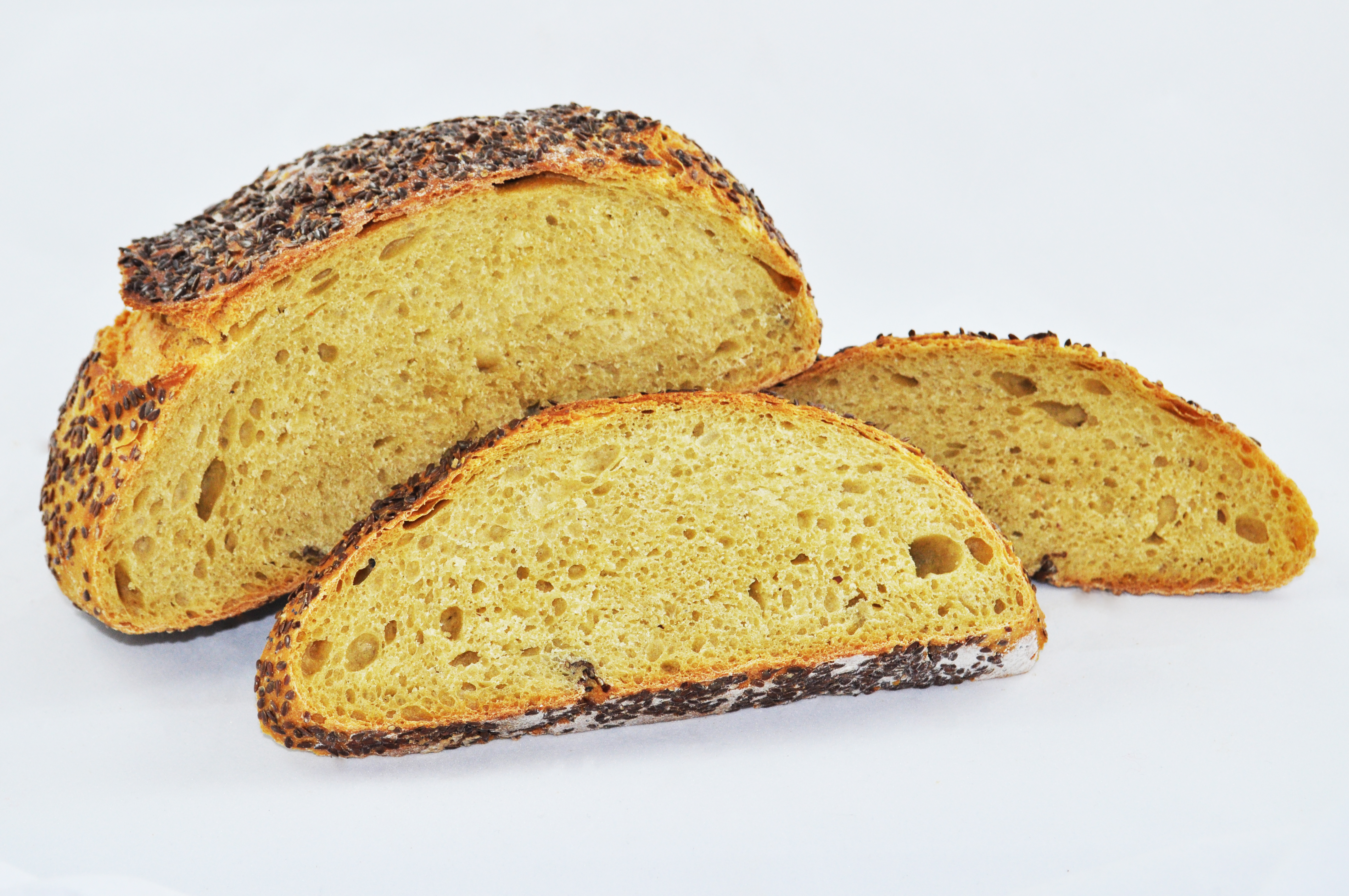 Produits